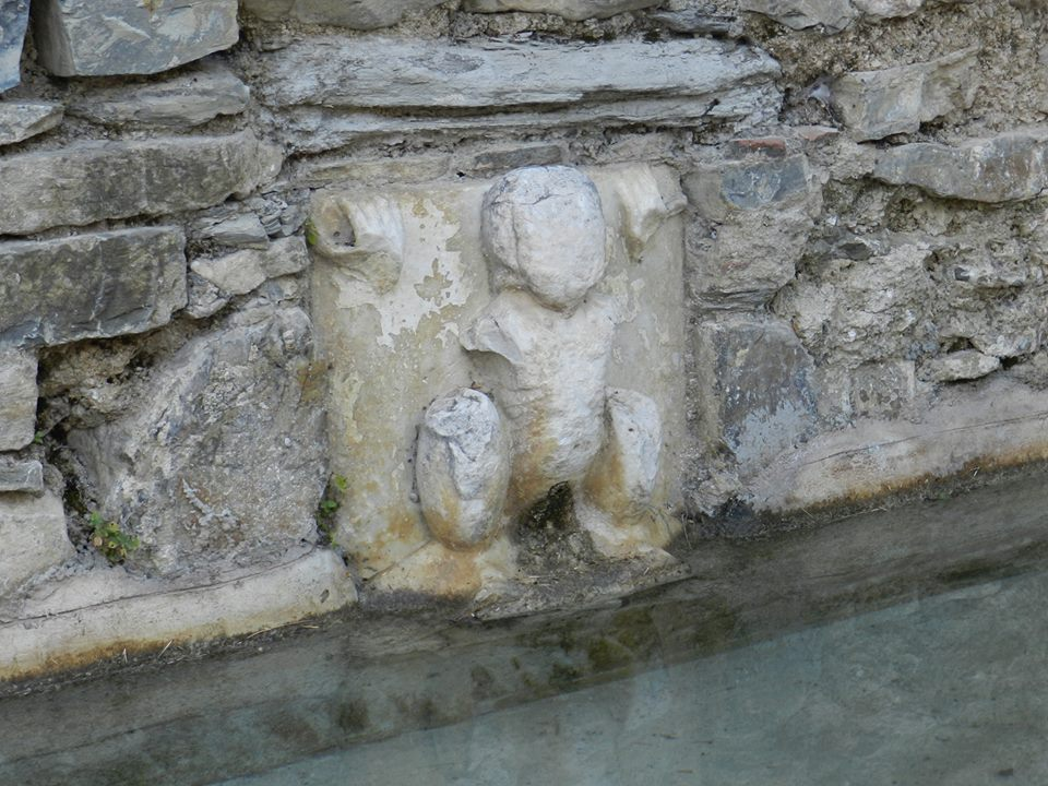 Scultura in piazza G. Nicotera - Roscigno Vecchia